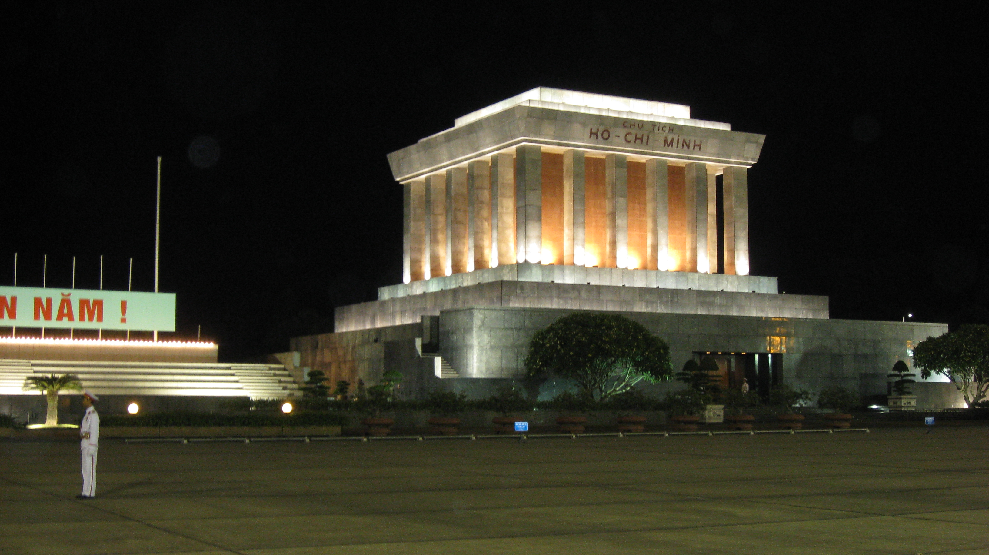 Ho Chi Minh Mausoleum ホー・チ・ミン廟